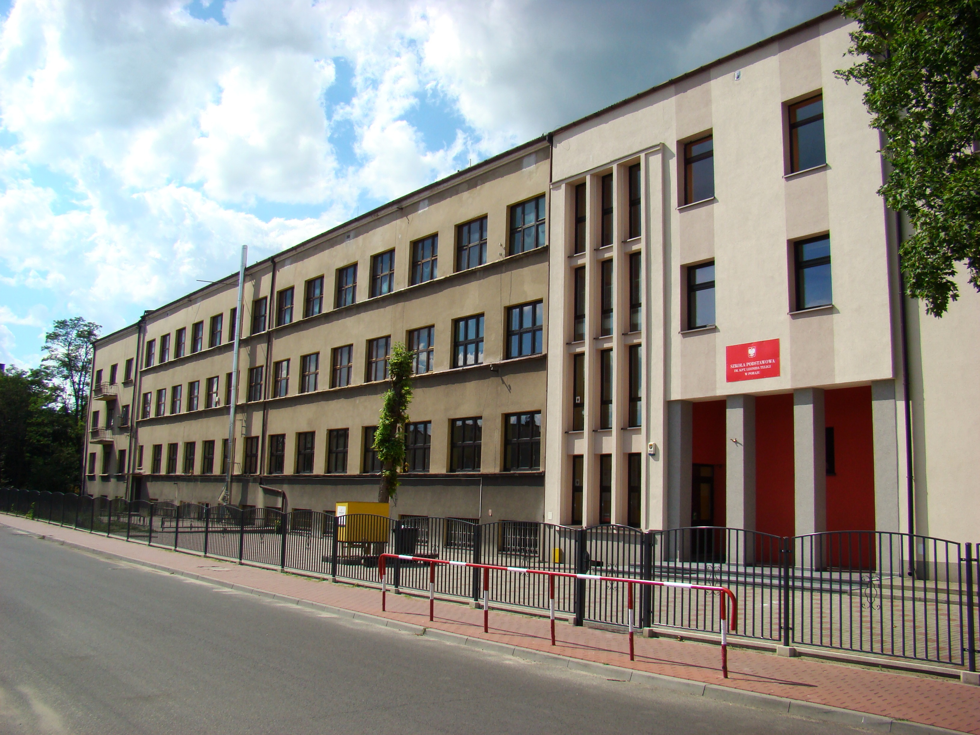 Szkoła Podstawowa im. kpt. L. Teligi w Poraju.